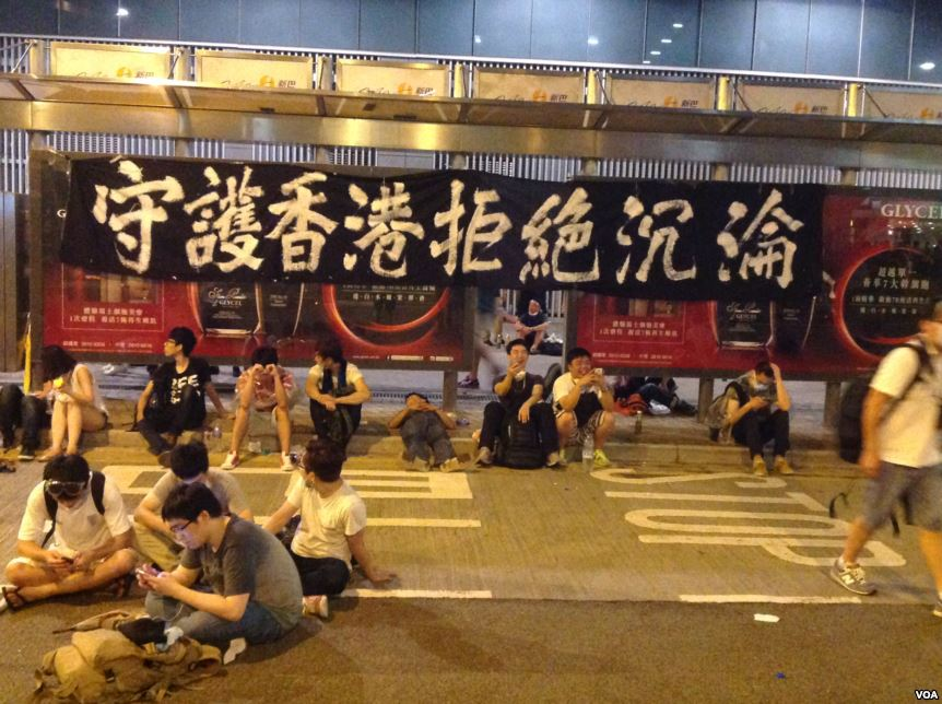 中文（台灣）: 星期一淩晨金鐘附近仍有數萬市民學生堅守